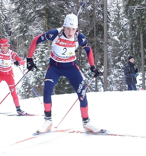 Marie Laure Brunet